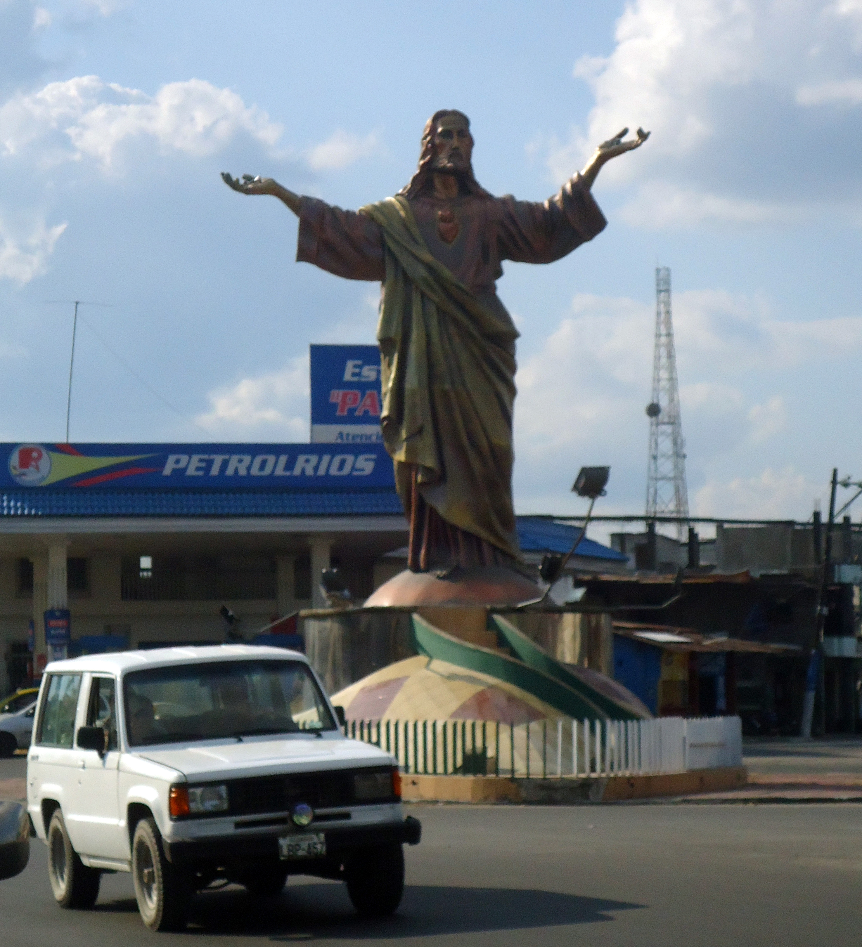 Monumento al Sagrado Corazón de Jesús, Quinindé